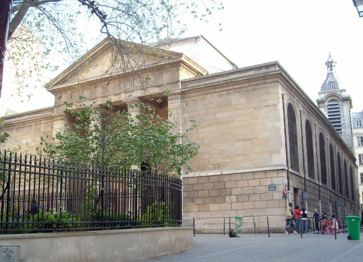 Vue générale de l'église depuis le nord. Entrée principale